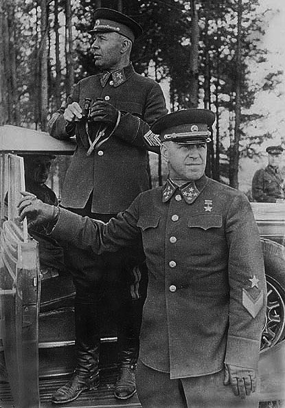 Генерал армии Г. К. Жуков и маршал С. К. Тимошенко на маневрах Киевского военного округа. 1940 год